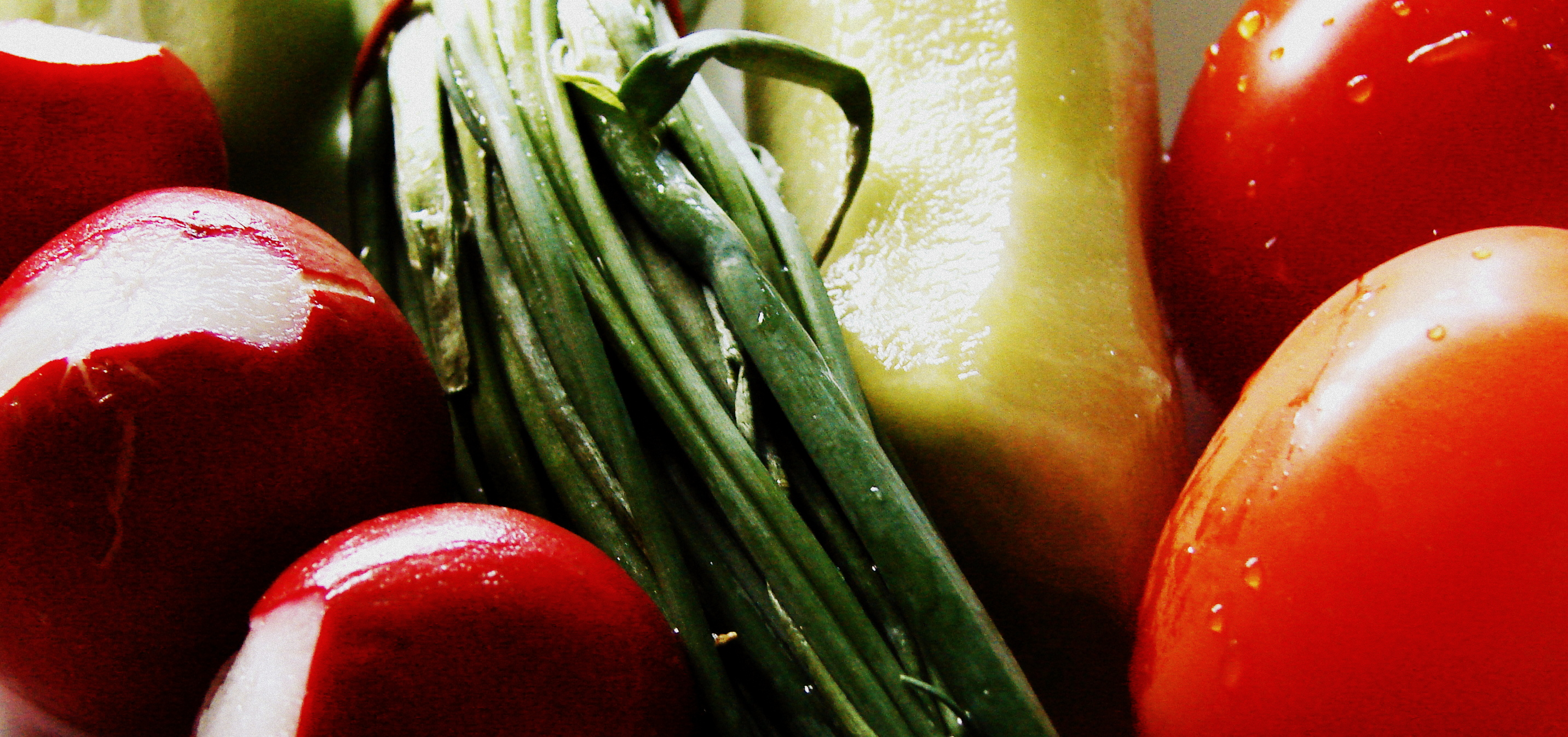 Nowalijki to młode warzywa, które zbiera się wiosną. Do popularnych nowalijek należą: rzodkiewka, sałata, ogórek, szczypiorek, pomidor, rzeżucha, natka pietruszki. Nowalijki możemy uprawiać pod tunelem foliowym, gruncie, oraz w domu.